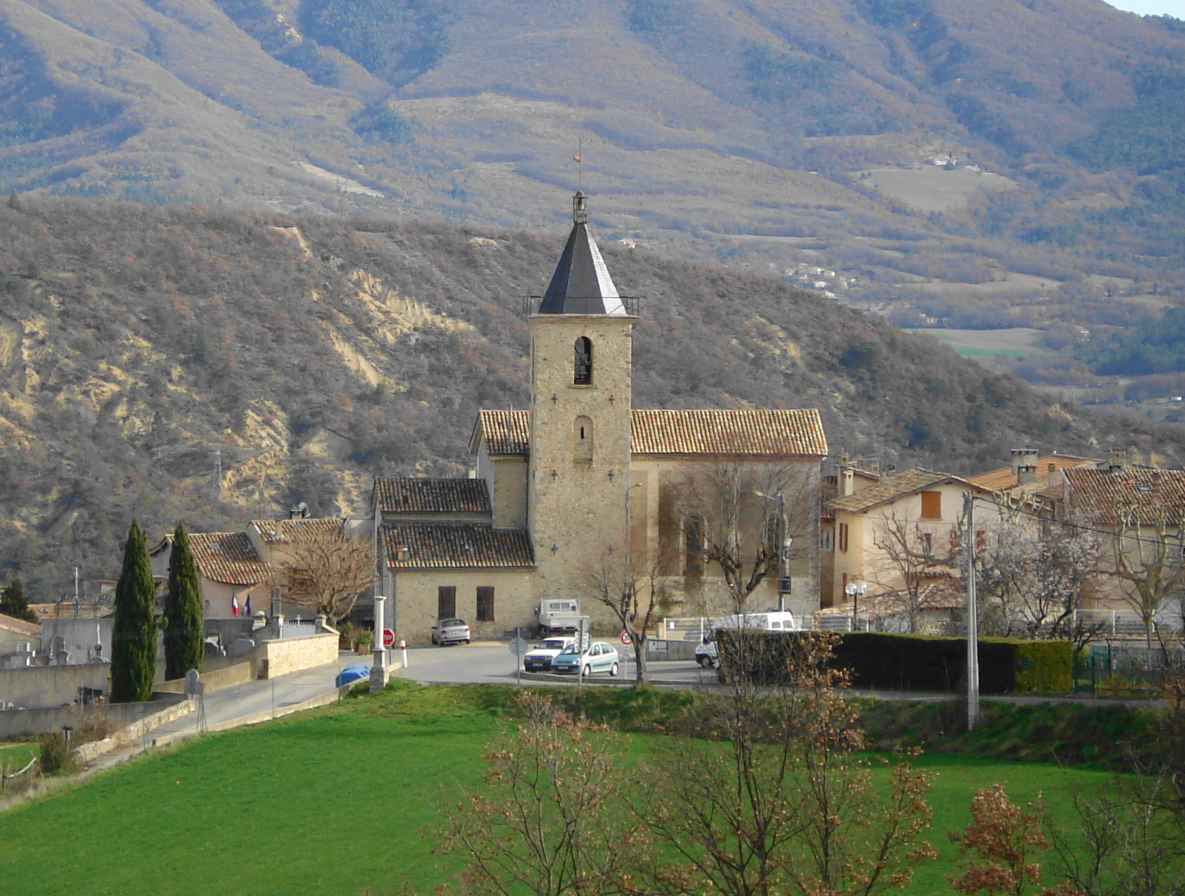 Photo du village de Champtercier, France